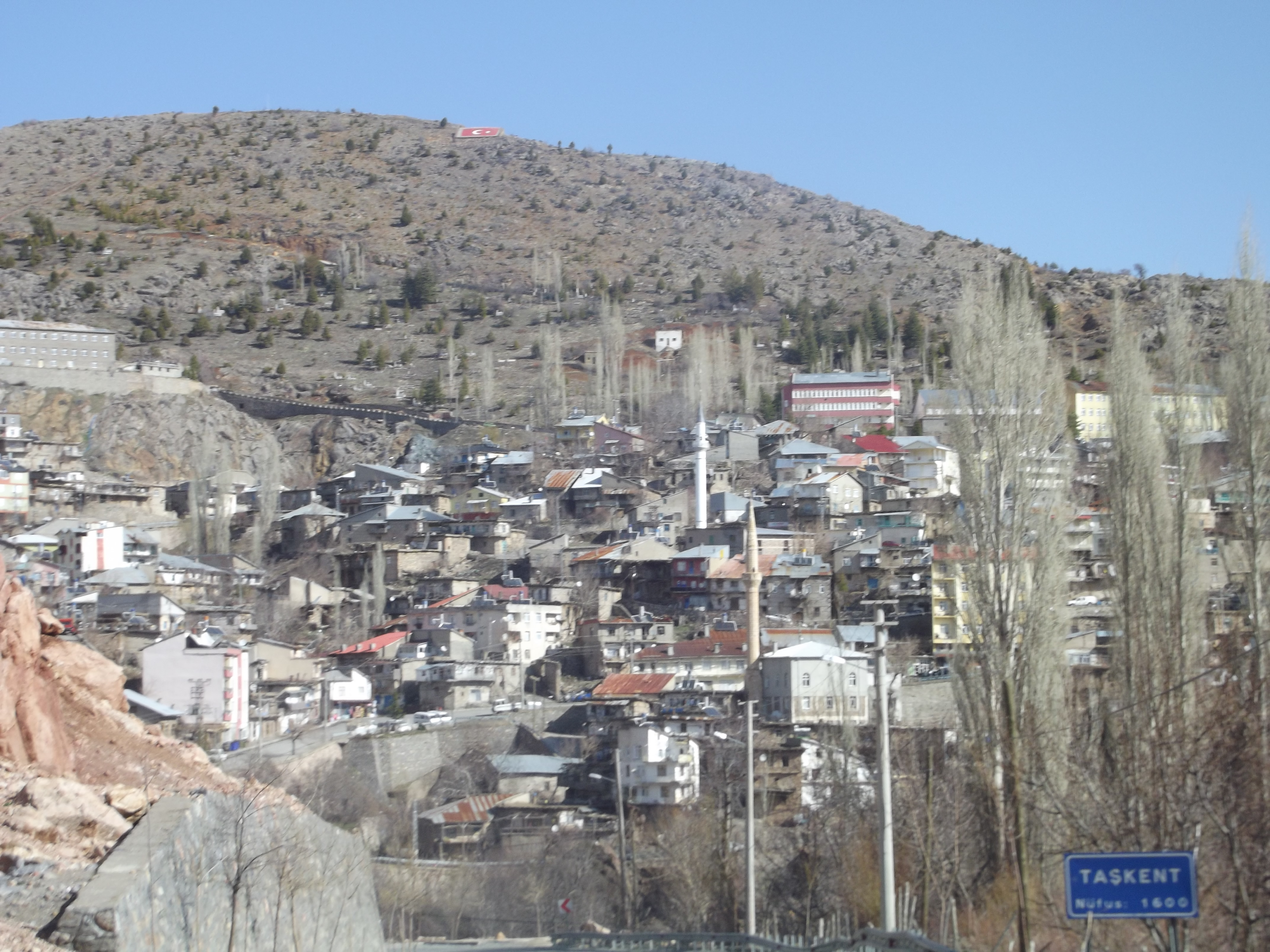 Taşkent